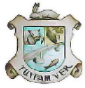 A fines de 1973 siendo Gobernador Rafael Hernández Ochoa, realizó una importante reunión estatal de presidentes municipales y desde luego invitó al de Túxpan que en esa época lo era Alberto Arango de la Huerta, y textualmente le dijo -Presidente Arango, quiero que en esta reunión con los presidentes del estado, estén presentes los Escudos de cada Municipio, por lo cual le pido a Ud. traiga el suyo- Beto quedó aterrado cuando se enteró que no había tal escudo de Tuxpan, pues la reunión iba a ser en breves días; sin embargo recordó a un eminente artesano radicado en Coatepec, que le había hecho hermosos trabajos en Pergamino para otorgar reconocimientos municipales a funcionarios públicos que con sus gestiones y apoyos habían beneficiado al puerto. Inmediatamente se dirigió a verlo y le expuso el proyecto del escudo de la ciudad y de la premura para realizarlo. El señor de muy buena disposición le preguntó -Dígame Sr. Presidente, ¿qué es lo más bonito que tiene Tuxpan?, Y Beto le contestó: - su Río. - las preguntas se siguieron - ¿Qué es lo que más produce? - pues su Ganadería, su Pesca, y los Cítricos, respondía Beto, por último le cuestionó - ¿Qué significaba el vocablo Tuxpan? Y respondió que era el sitio de los Conejos -. De esta manera el presidente tuxpeño pudo llevar a la reunión con el Gobernador Hernández Ochoa, el escudo de la ciudad: Un pergamino típicamente Heráldico, con un Conejo - ahora echado, antes estaba sentado - en la parte superior; un campo dividido en tres secciones: La superior izquierda, con la cabeza de un semental de raza cebú; la superior derecha, con el dibujo de una mazorca de maíz y un ramo de naranjas; la inferior con el puente sobre el río y un pez.